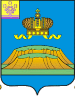 Герб Мариинский Посад